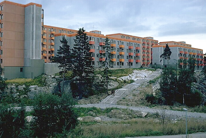 Bilden troligen från början av 1970-talet. Motiv: Rinkeby Kategori: Bostadsområde Bilden troligen från början av 1970-talet.